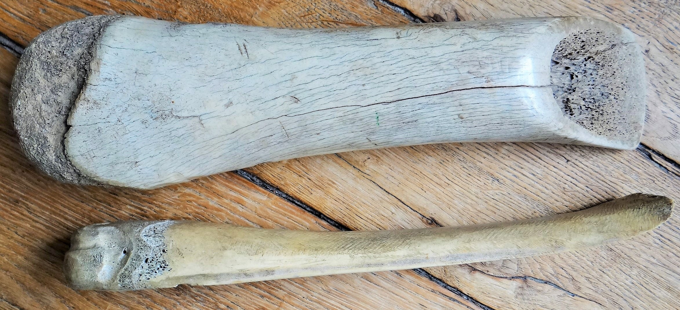 écorçoirs en tibia de cheval utilisé pour retirer l'écorce des arbres coupés en forêt d'Annoux